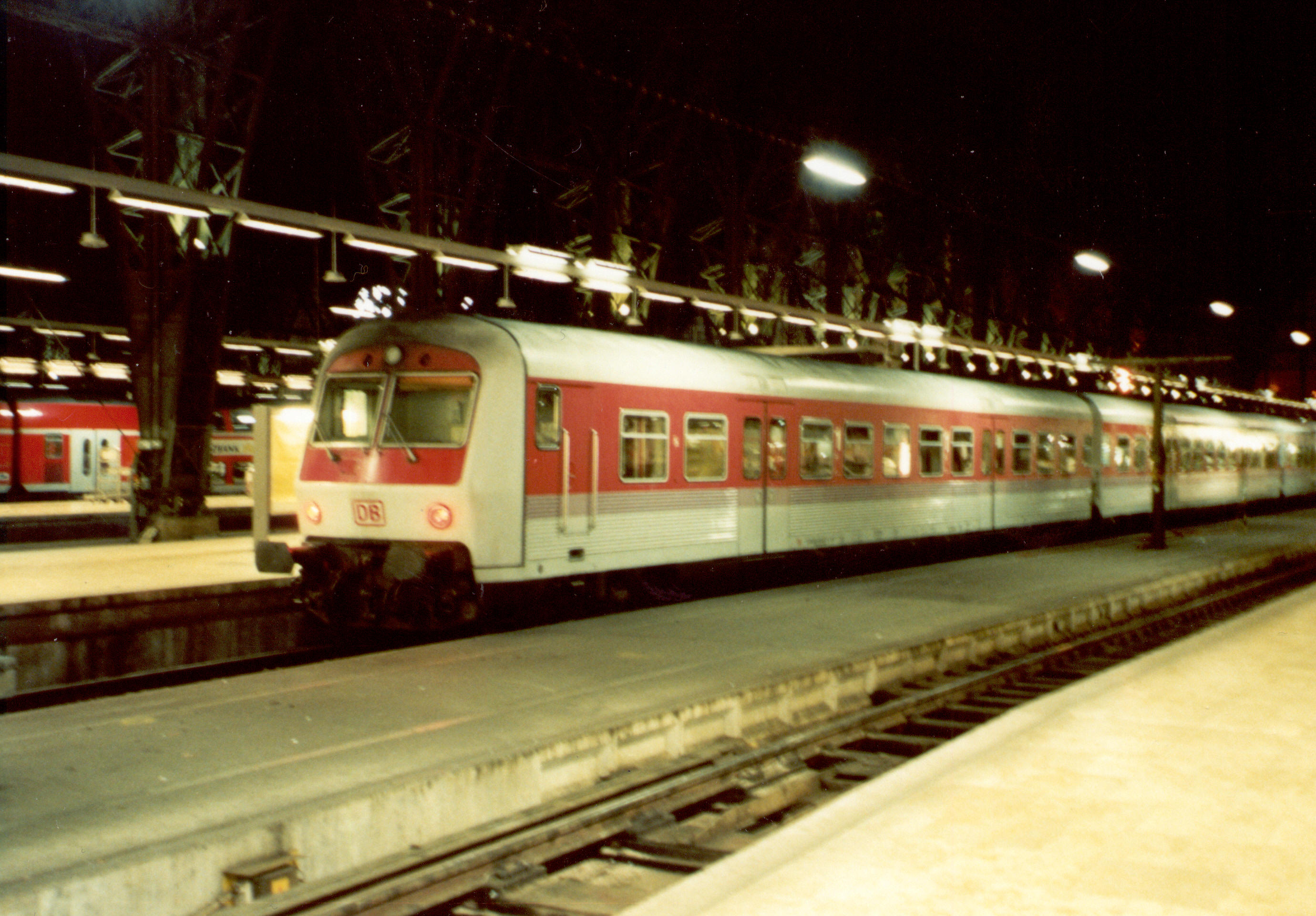 Steuerwagen der Bauart Azf 209 am 06.05.1998 um 1:10 Uhr in Frankfurt (Main) Hbf am Schluß des IC 922 nach Düsseldorf Flughafen (ähnlich wie x-Wagen)